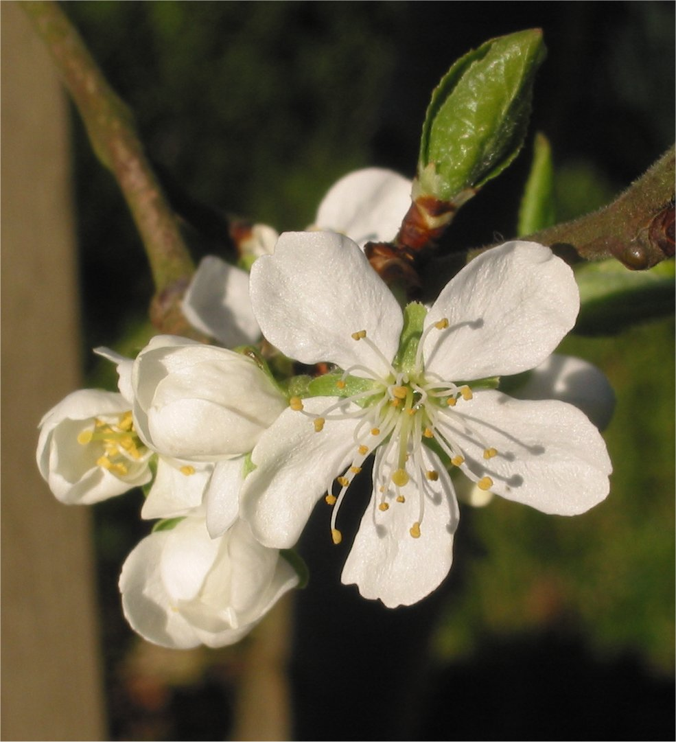 (nl: Pruimenbloesem Reine Victoria) Prunus domestica flower 'Reine Victoria'